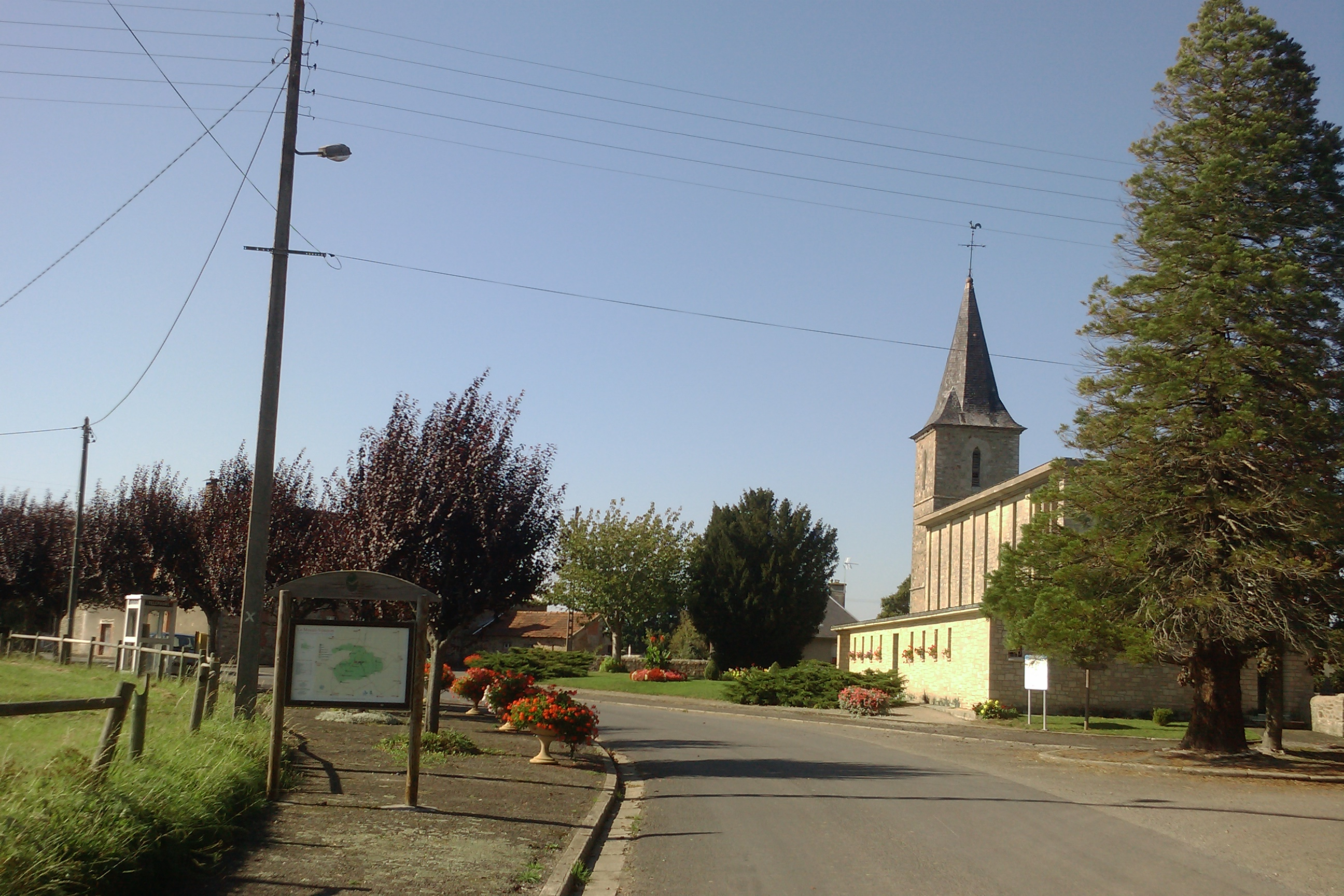 Vue de la commune de Le Mesnil-Véneron